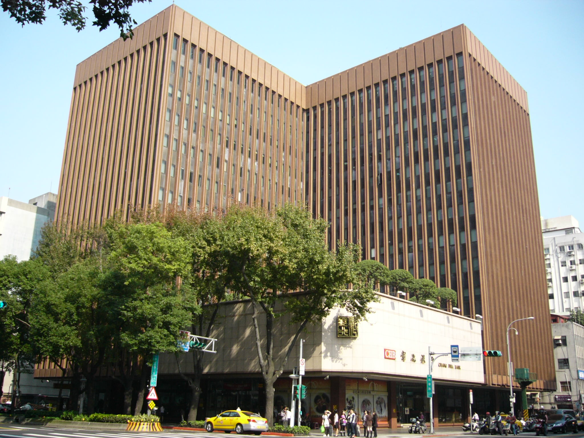 中文（台灣）: 彰化商業銀行總行，位於臺北市中山區中山北路二段57號，1樓為總部分行。